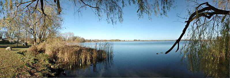 Panorama des Mündesses von der Stadtseite aus gesehen